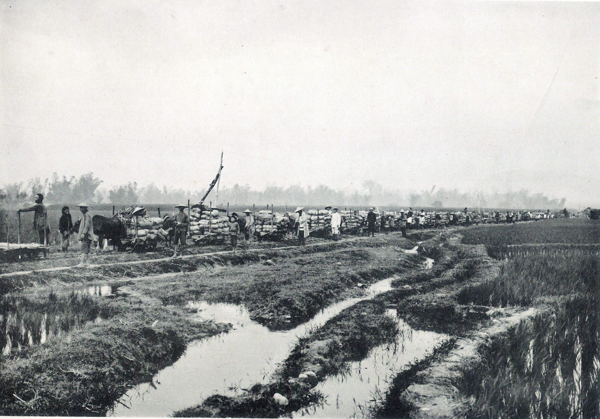 埔里社對外交通最早開通的「埔里社輕鐵線」，原由「埔南公司」取得路線經營權，後轉讓給「埔里社製糖會社」增資進行路線延長及修繕，終於在明治44年(1911)11月7日舉行開通始業式，這條輕軌全長約20.6公里，從埔里出發通往水頭，經由耶馬溪峽谷，經過加道坑、大林、五城然後到湳仔(名間)，接續明治製糖的二水線至南投或二水接縱貫鐵路，後由於集集線完成，才縮減為埔里至外車埕(今水里鄉車埕)。 「埔里社輕鐵線」通車後從此大大加快埔里貨物與客運的運送便利，在商品的供應上對埔里商況促進大繁榮發展。大正2年(1913)臺灣製糖株式會社併購「埔里社製糖會社」，從此成為台糖鐵道文化的一員。圖為埔里社輕鐵手押台車通過水頭庄前的風景舊影，約攝於大正3年左右(1914)，推測為今均頭國中前到水源地這一段的水頭路沿線側。由臺灣製糖會社埔里社製糖所經營的這條「埔里社輕鐵」手押台車營業線，除供社用品的搬運外，也供一般旅客及貨物運送。圖所見正在通過埔里水頭庄前的成排臺車，上面滿載埔里社製糖所的砂糖與蔗苗，可見有一穿白色文官服的會社官員隨行押運，因為埔里社至魚池五城間的這段鐵道是上坡，需要人、牛一起奮力拖拉推進，十分辛苦。百年前埔里對外交通臺車的舊影，真是萬分珍貴。 圖：感謝林志明醫師提供